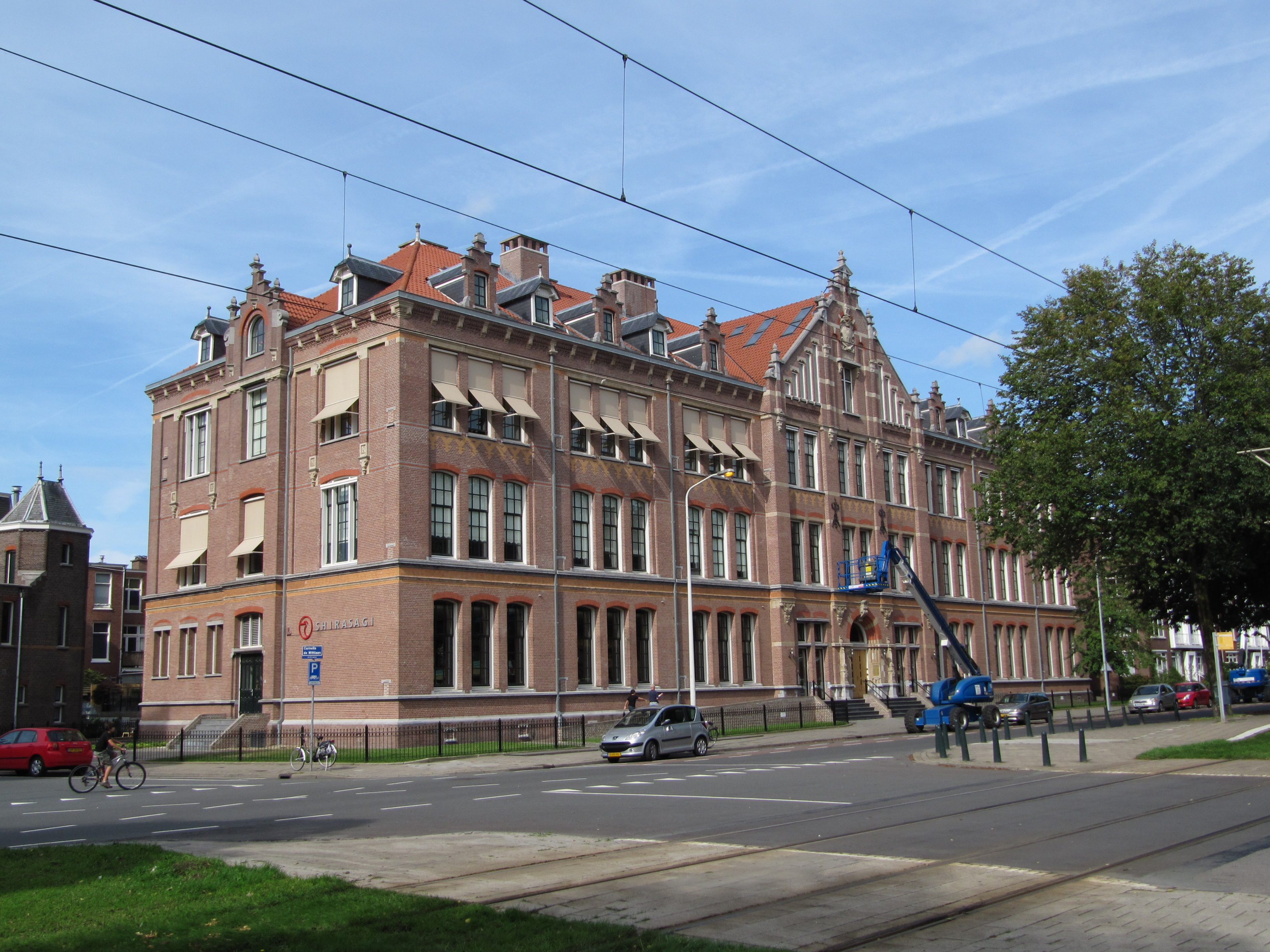 Dalton Hogere Burgerschool voor Meisjes (1935 - 1968)- Den Haag Address Stadhouderslaan 82 2517JA The Hague Netherlands DateSourceOwn workAuthorMichiel1972Permission (Reusing this file) This media file was made by Michiel1972 You may use it using a redistributable license (cc-by-sa), see below Please credit this : M.M.Minderhoud or Wikipedia/Michiel1972 Licensing[edit]